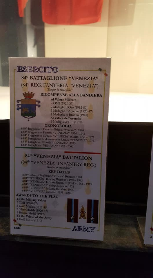 Sacrario delle bandiere Al Vittoriano Roma - dettaglio del 84° BTG Venezia